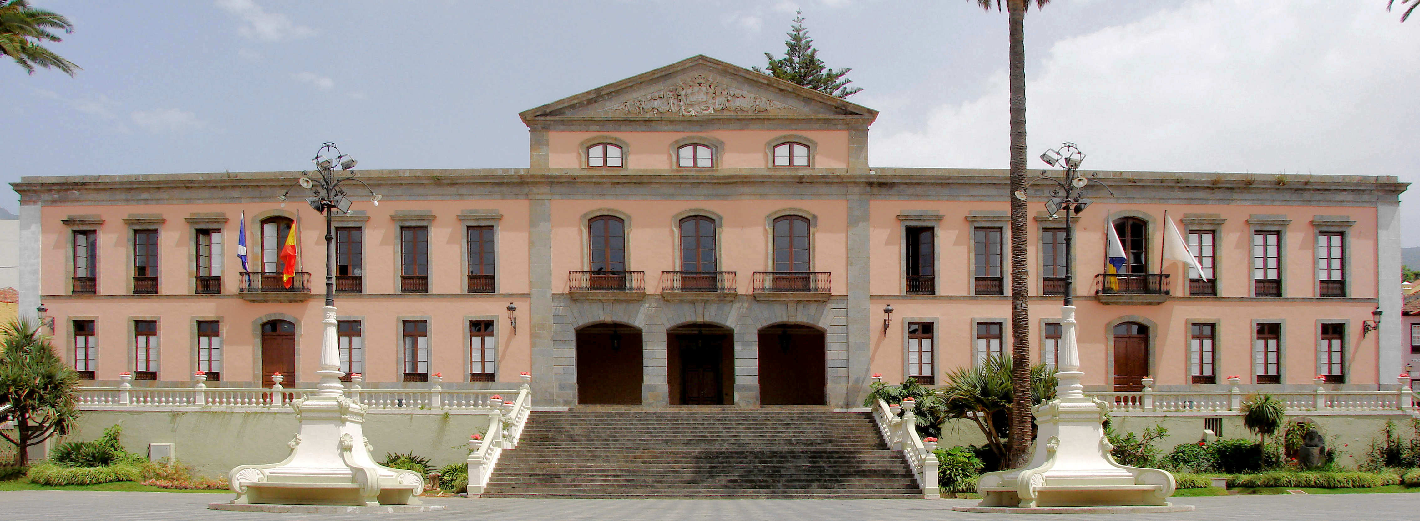 Ayuntamiento fachada norte